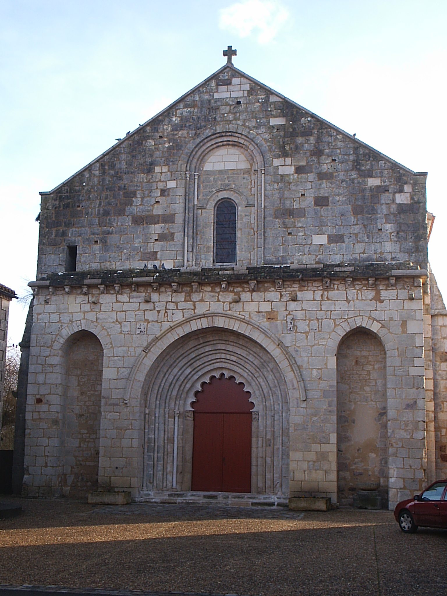 Eglise Notre-Dame de Plaisance